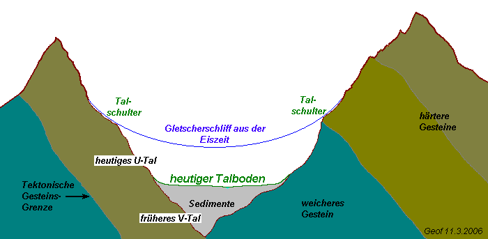 Schematischer Querschnitt eines quartär geprägten Gebirgstales in den Zentralalpen